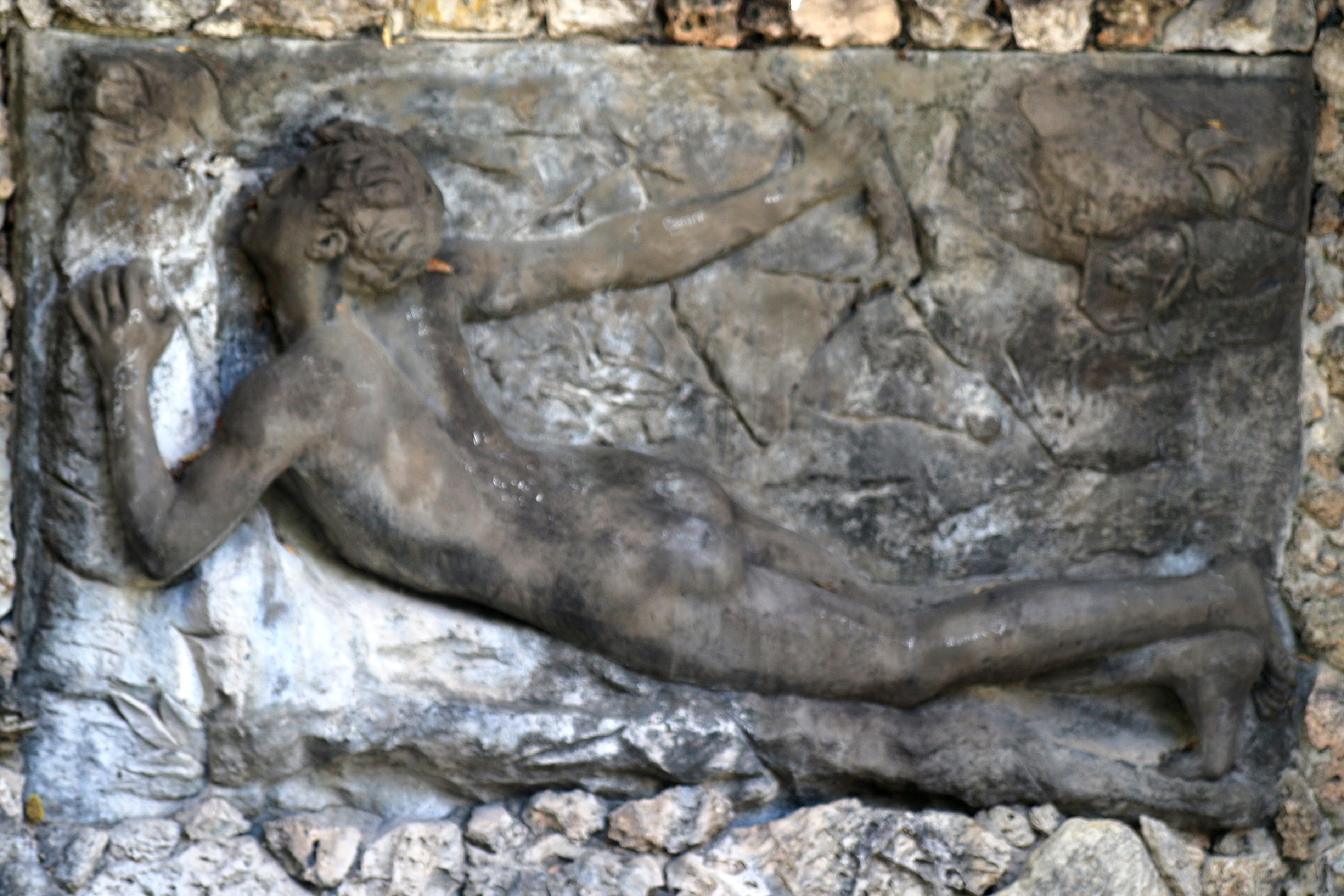 Bas-relief en bronze sculpté par Benoît Lucien Hercule représentant Le buveur d'eau se trouvant dans le jardin Alexandre Ier à Toulon.